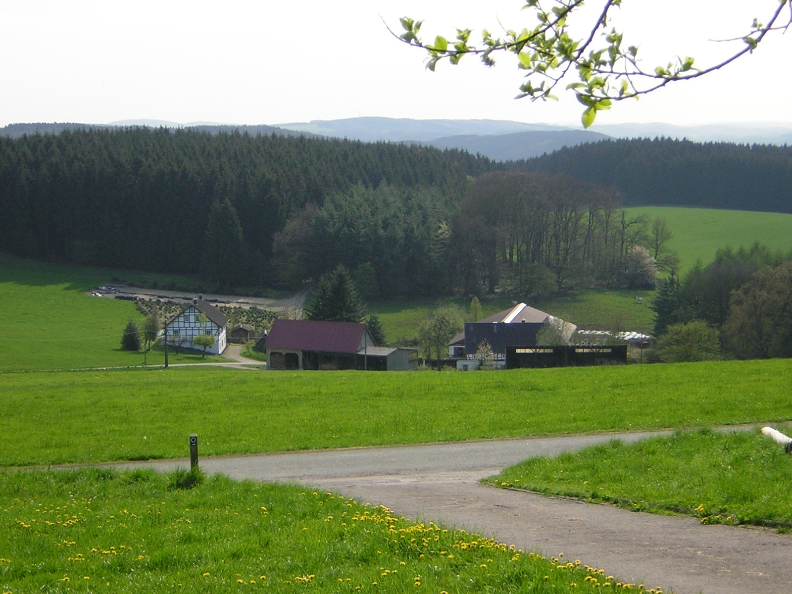 Wingenbach in Wipperfürth, Ansicht von Osten